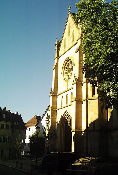 St. Johannes in Tübingen, römisch-katholische Stadtpfarrkirche, erbaut 1878 zu Ehren des hl. Apostels und Evangelisten Johannes.